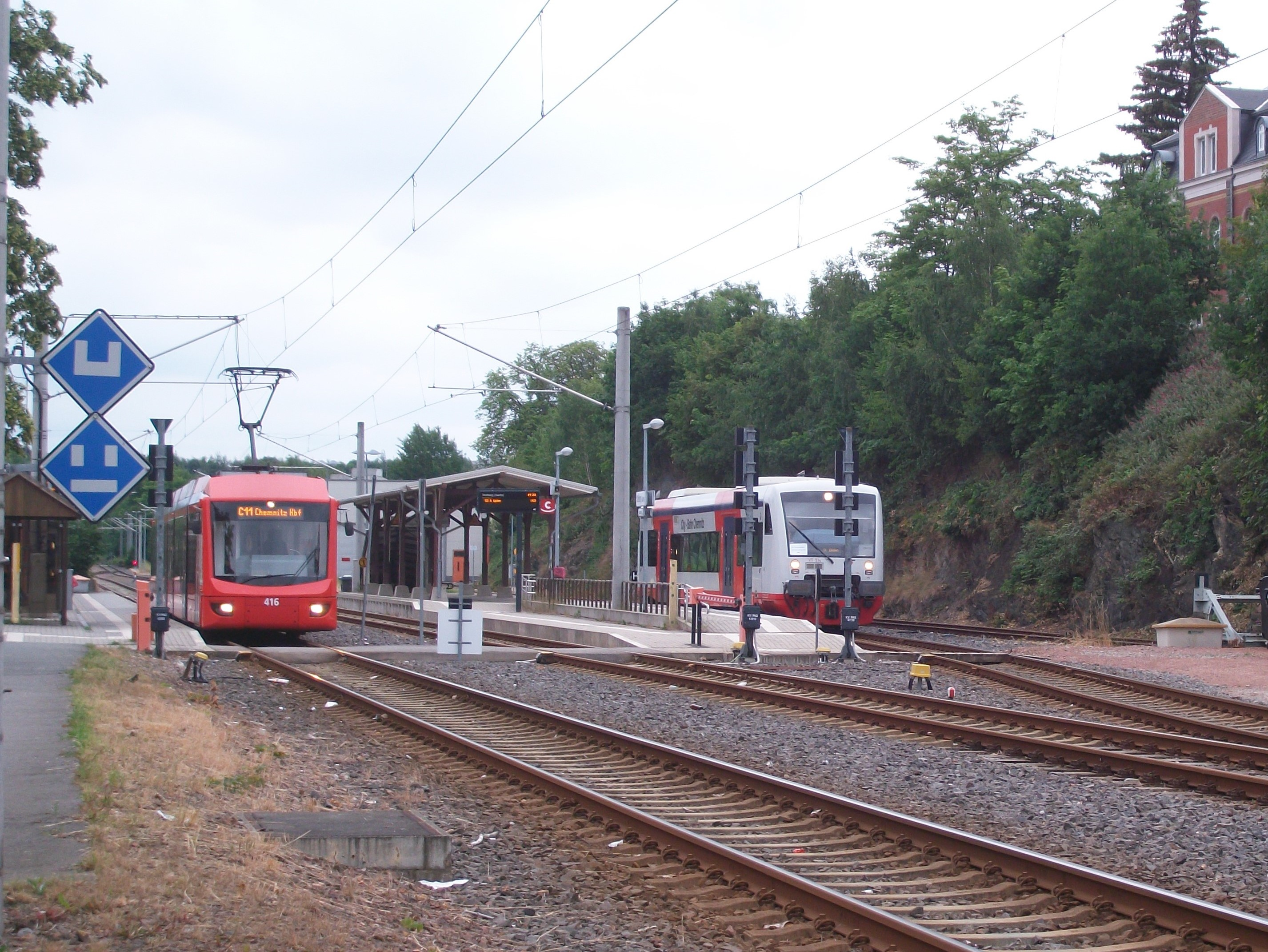 Bahnhof Stollberg (Sachs), Triebwagen der City-Bahn Chemnitz abfahrbreit in Richtung Chemnitz und St. Egidien (2018)